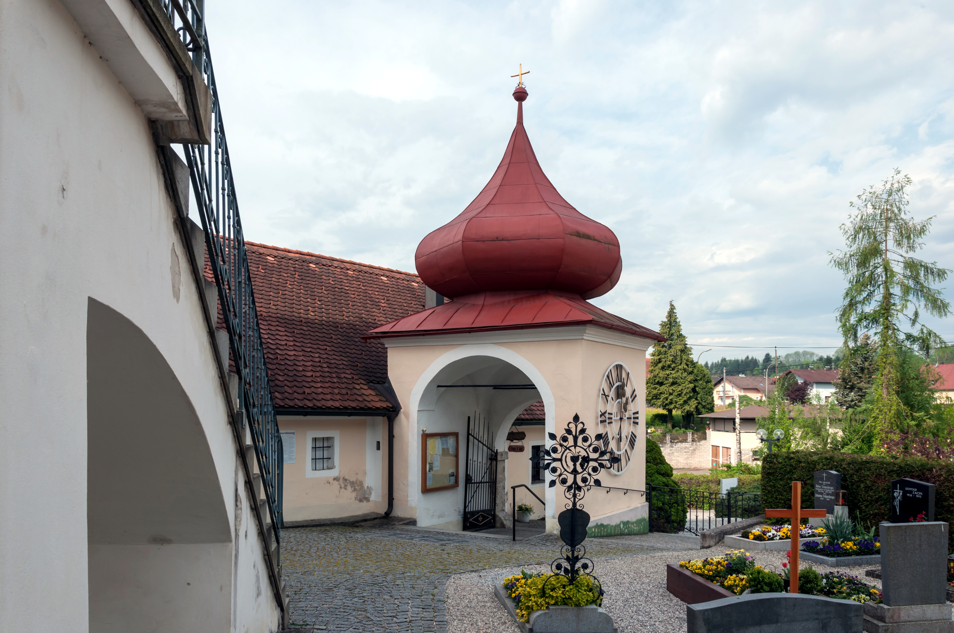 Das Portal zum Kirchhof von Fischlham trägt einen Helm wie ein Kirchturm.